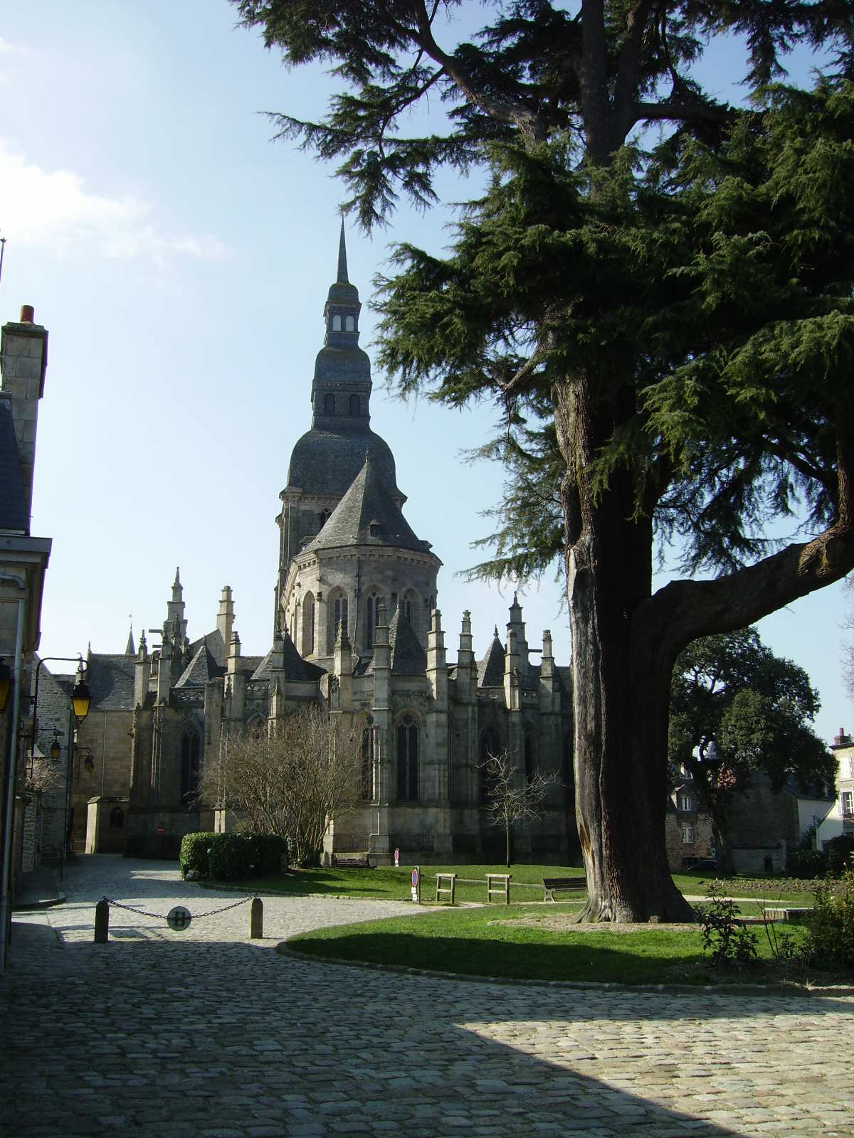 Preĝejo Saint-Sauveur ("Sankta Savanto") en Dinan (Bretonujo)